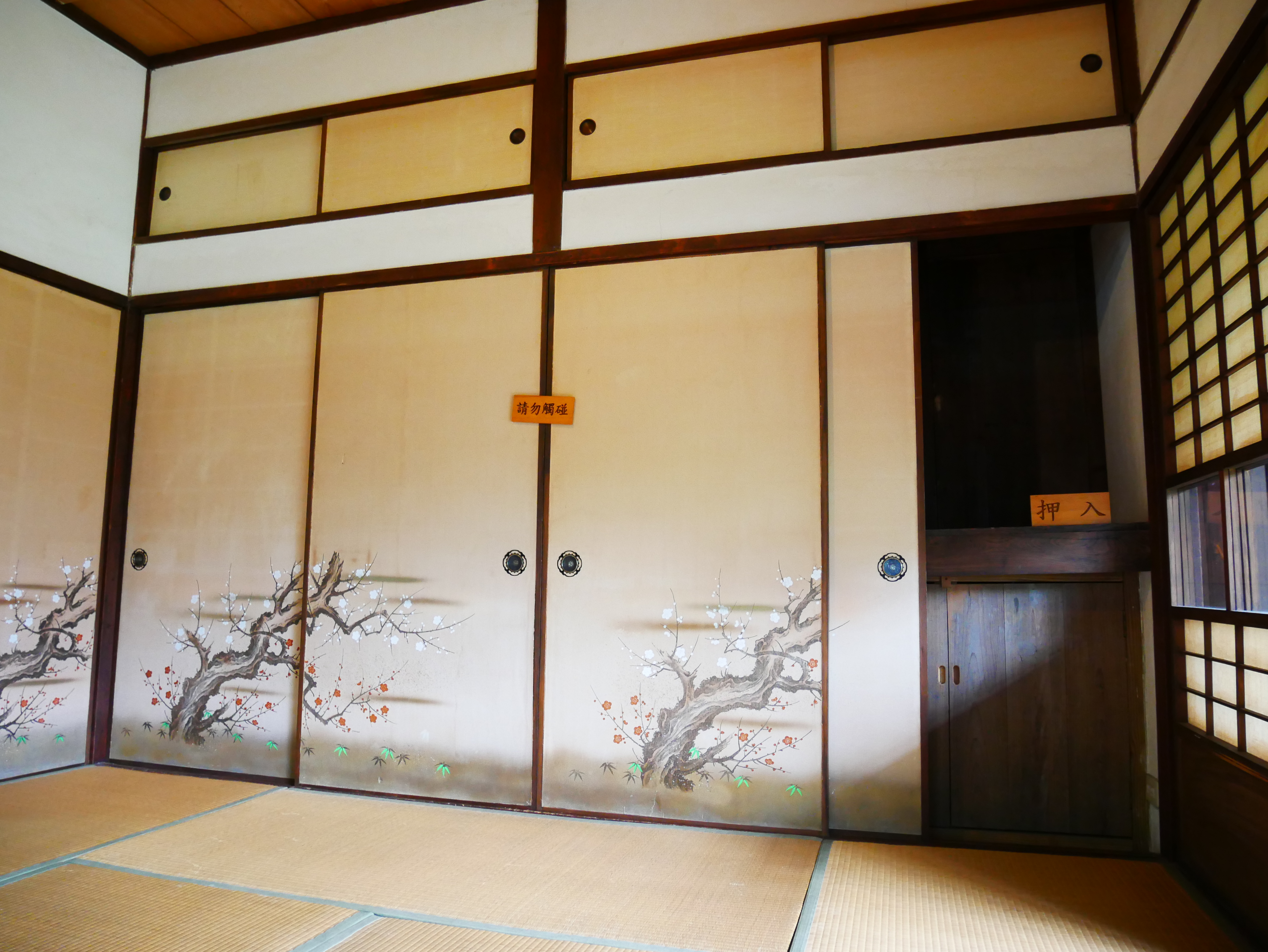 中文（台灣）: 辛志平校長故居押入，新竹市東區東門聯里育賢里